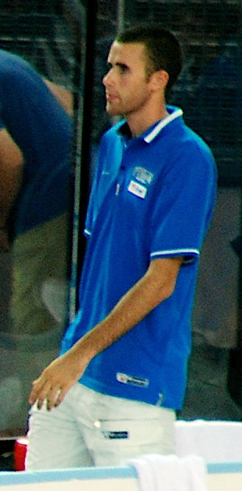 Luigi Datome